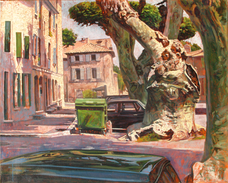 Saint Rémy de Provence Oil Painting, peinture à l'huile - 80cm x 100cm